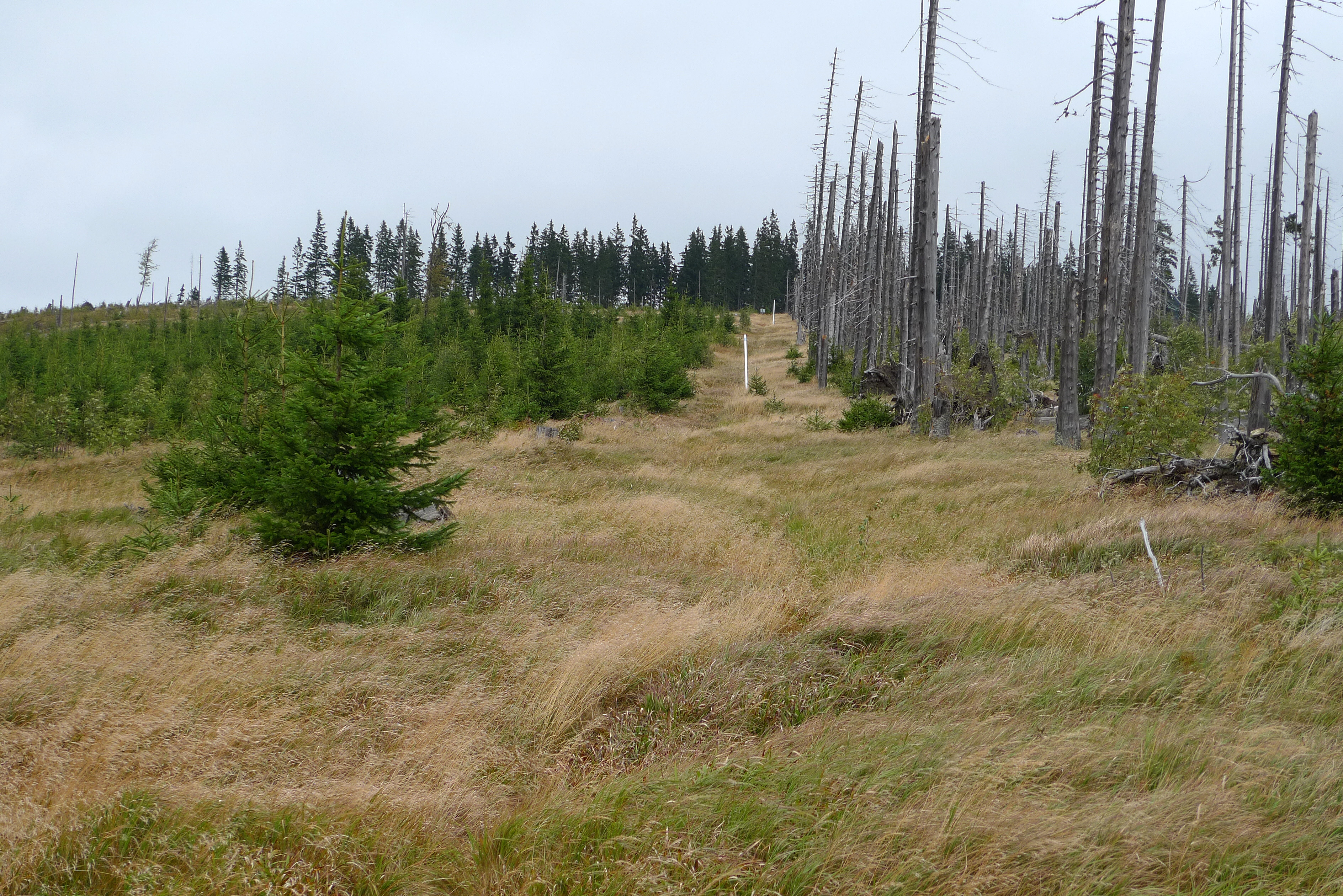 Šumava - hranice mezi Českou republikou a Německem, hranice mezi "lesnickým" a bezásahovým přístupem ke kůrovci mezi Siebensteinkopf a Stráží